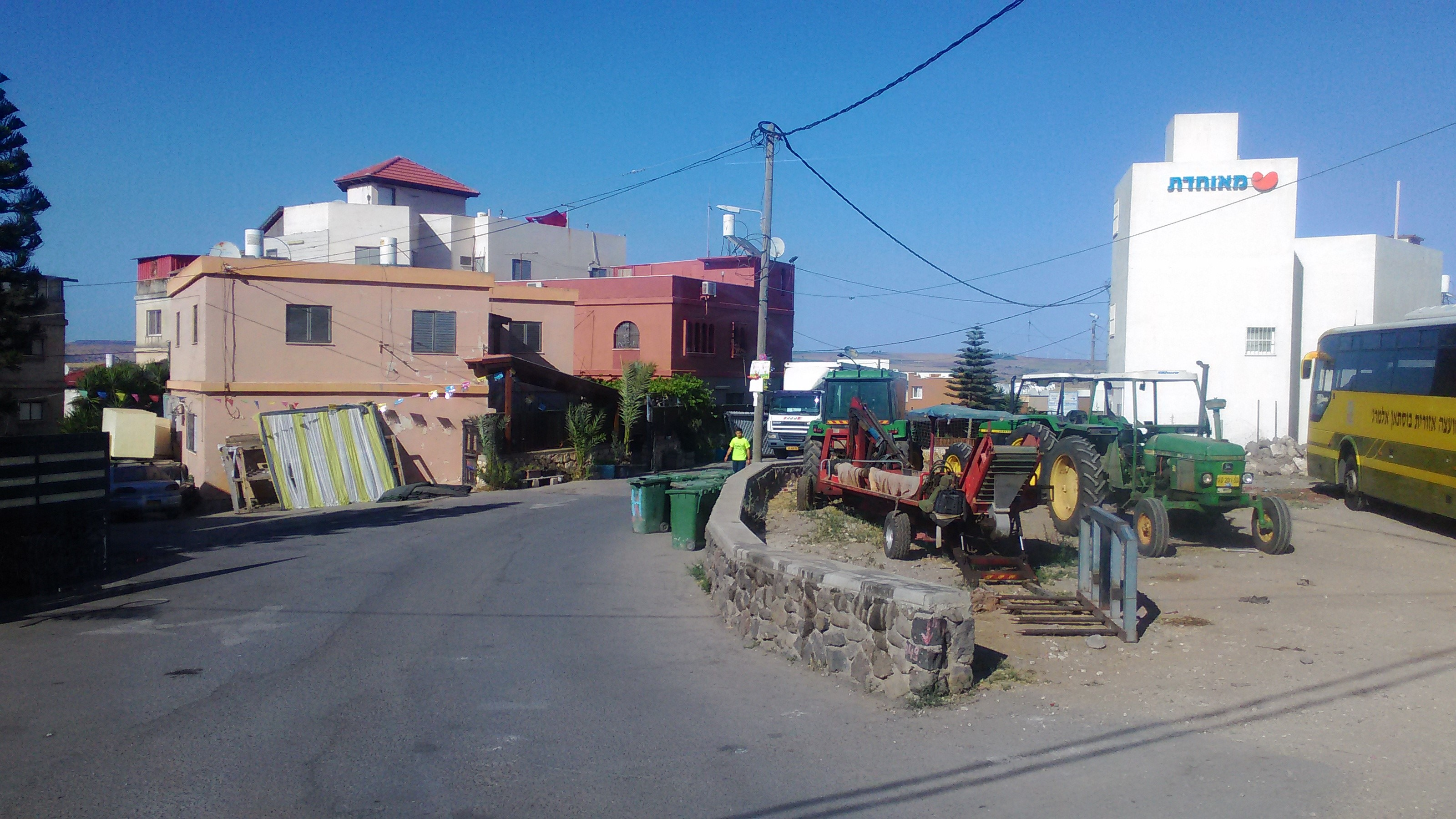 כפר מצר, 2017